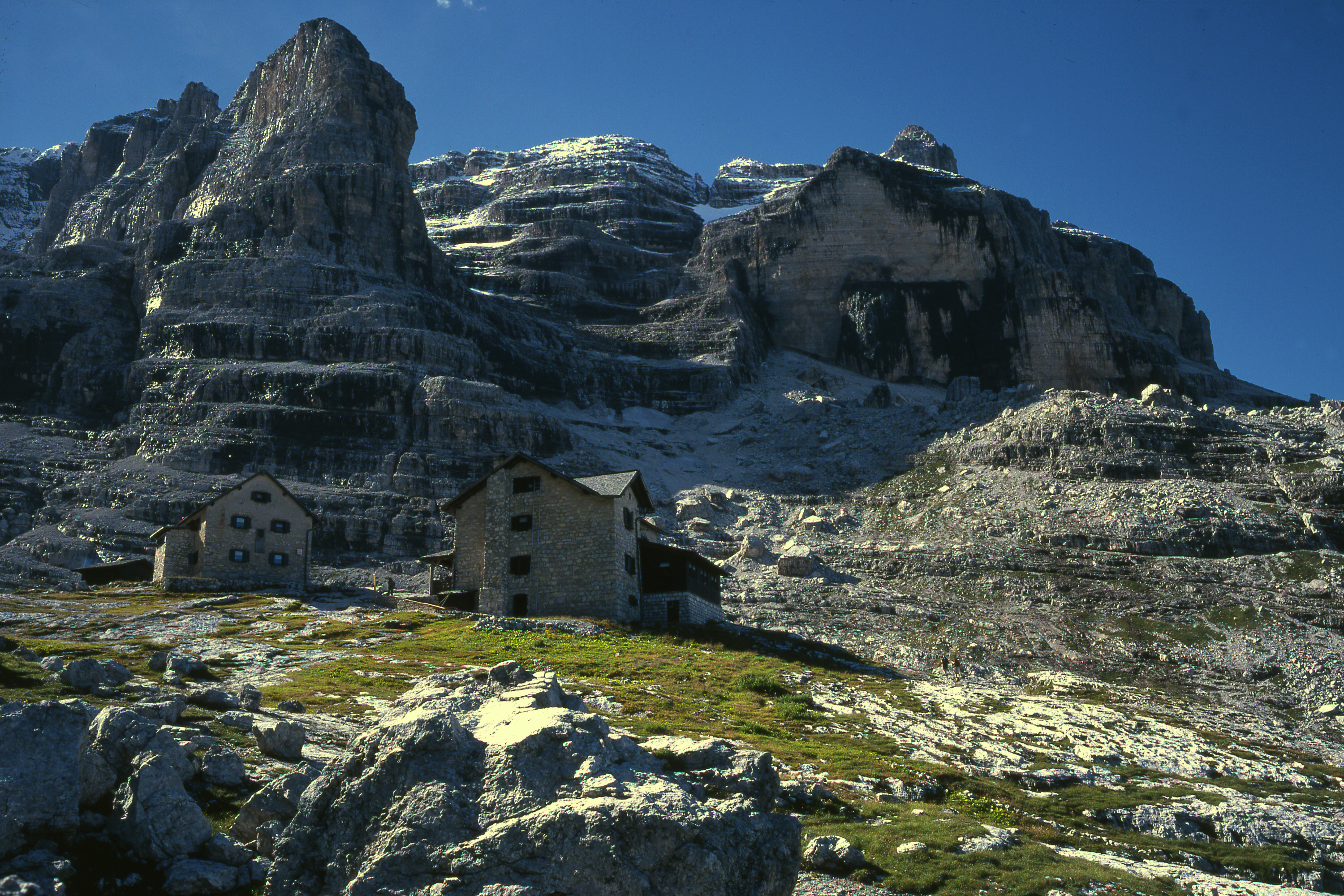 Tuckett-Hütte in der Brenta